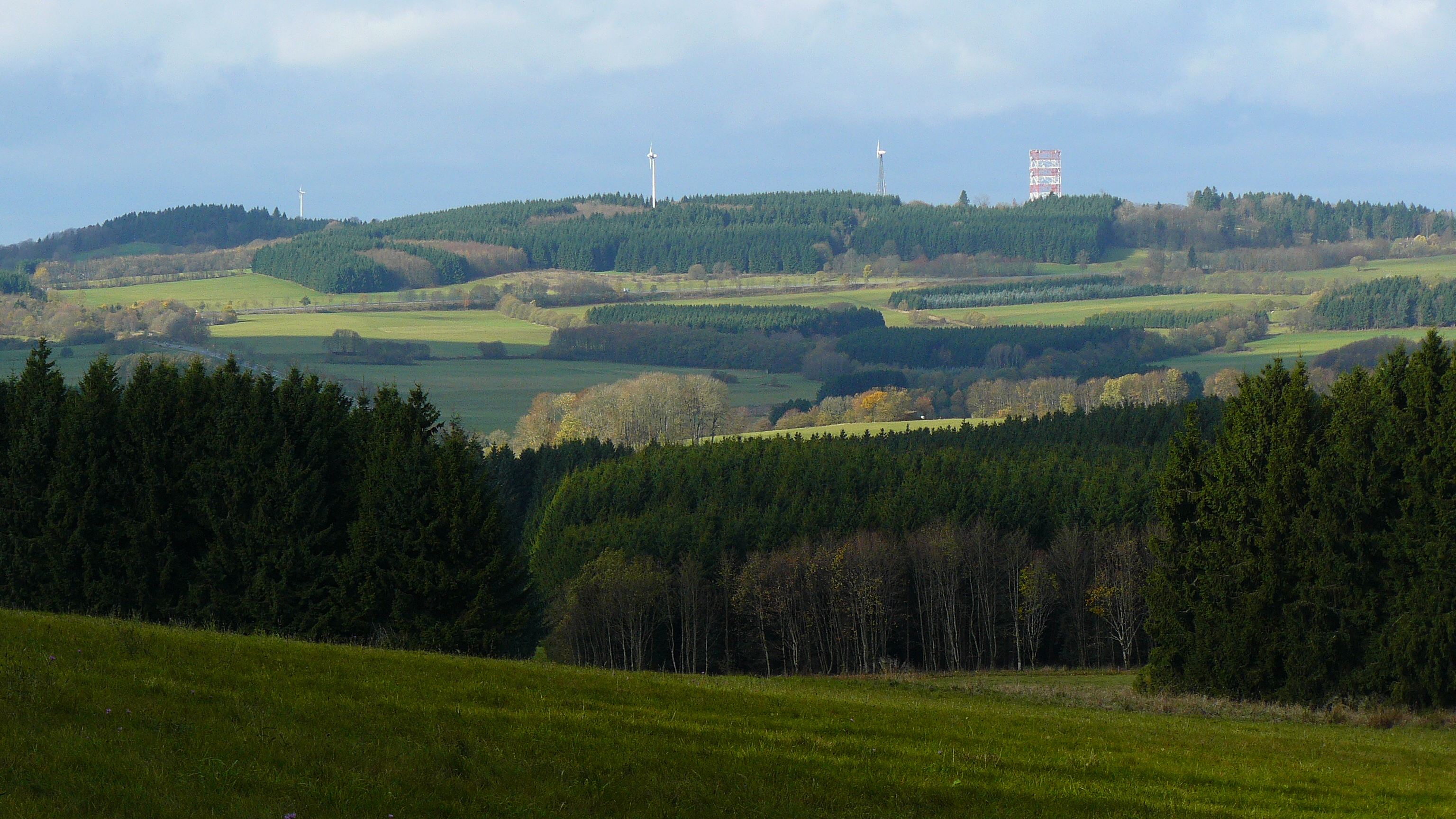 Der Salzburger Kopf mit dem Galgenberg (links) • Blick aus Südosten vom Nordhang des Hombergs über das obere Nistertal • Δ = 4,7 km; mrel = 3